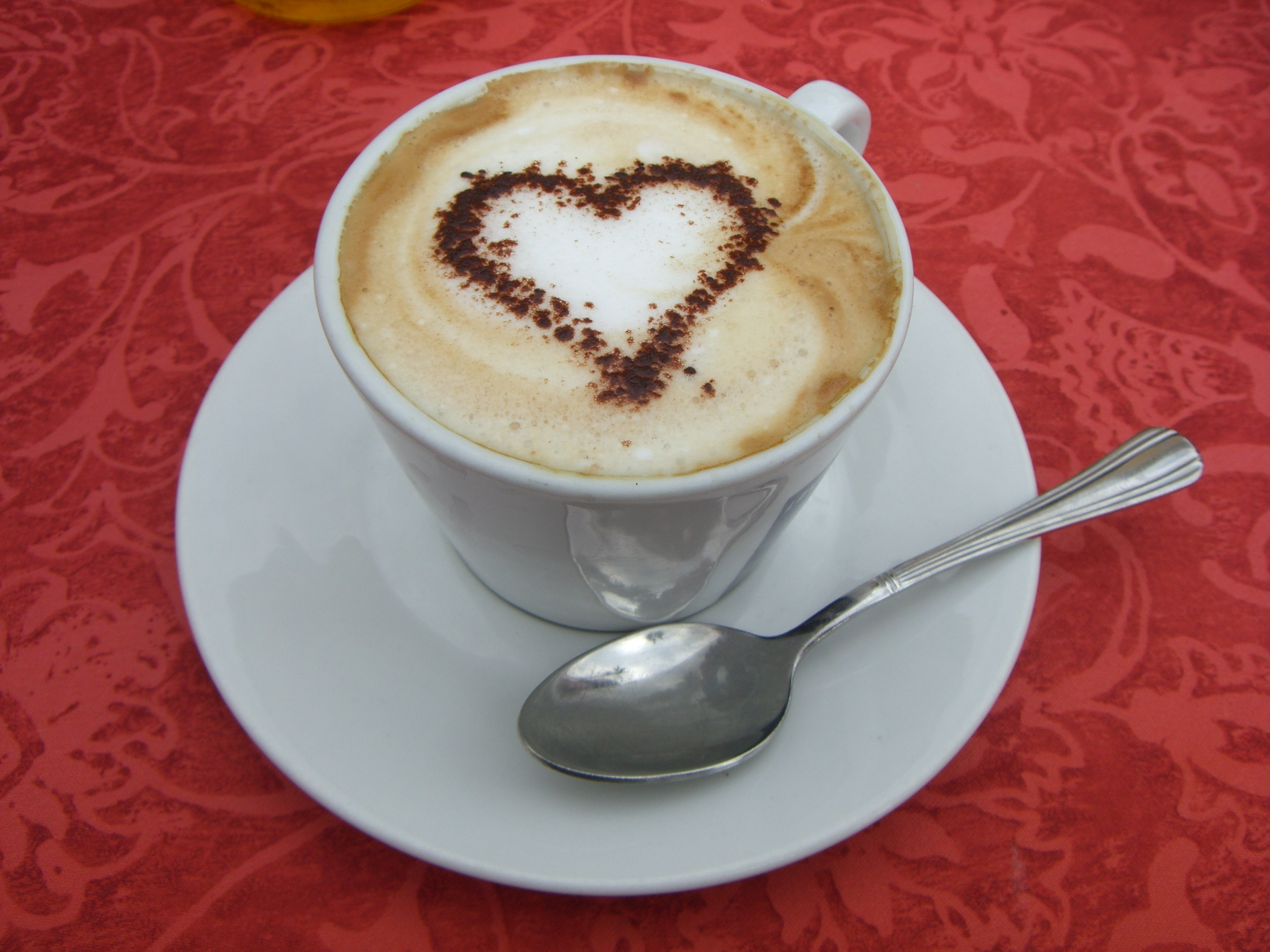 Cappuccino mit Kakaoherz